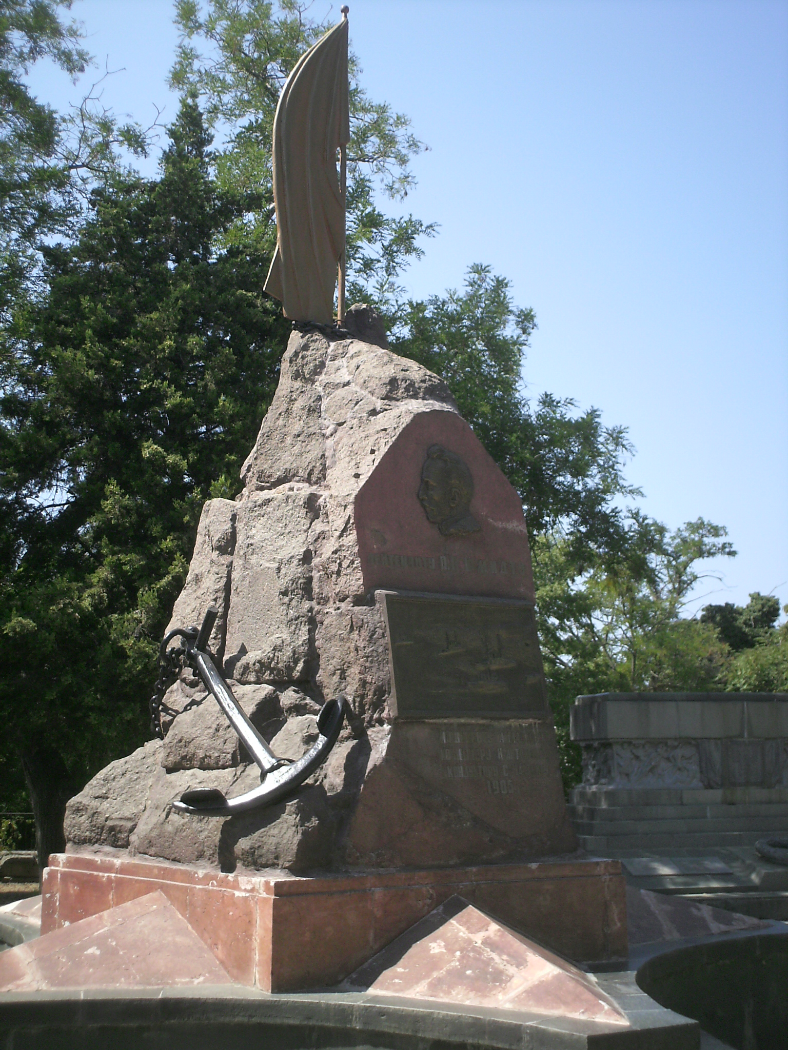 Руковолителям восстания на Черноморском флоте (П. Шмидт, А. Гладков, Н. Антоненко, С. Частник)